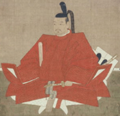 Hidekatsu Mizoguchi。溝口秀勝